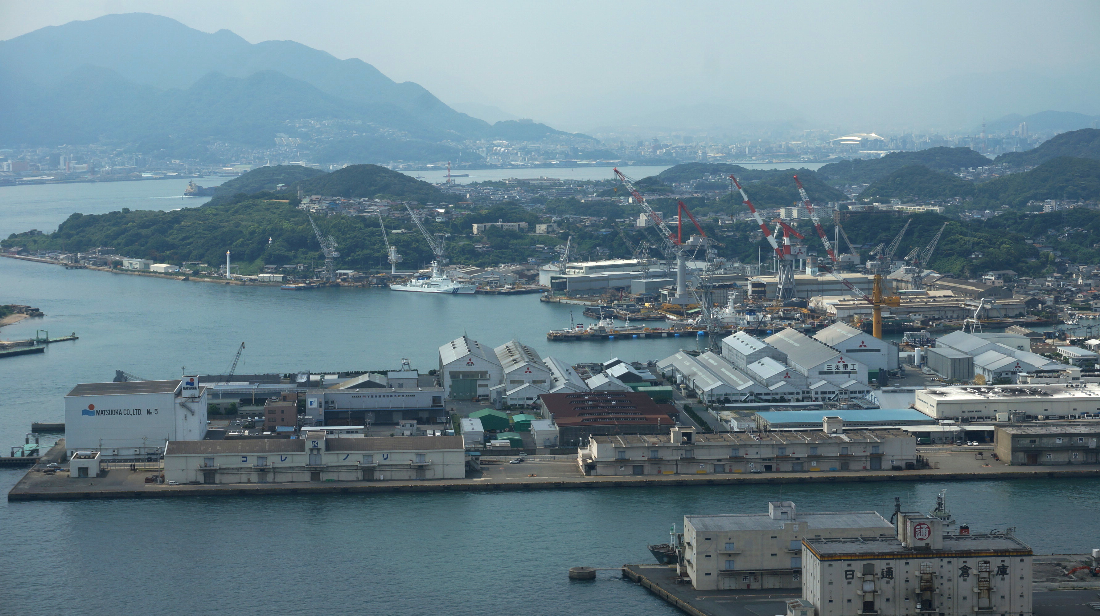 三菱重工下関造船所。棟が前後方向の建屋が並ぶ手前のエリアは大和町工場(やまとまちこうじょう)、小瀬戸を挟んで奥は江浦工場(えのうらこうじょう)。(2013年8月撮影)